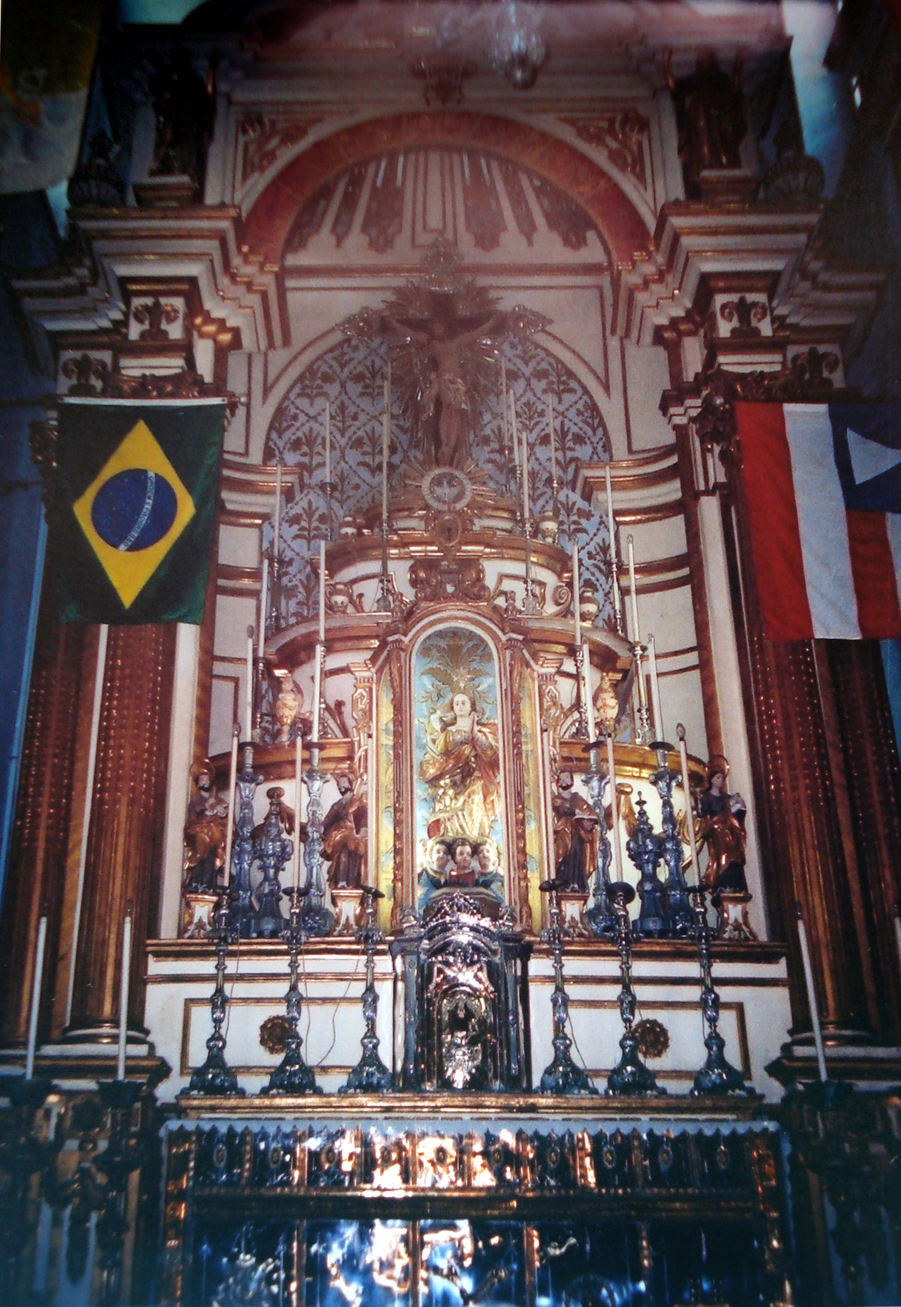 Altar-mor da igreja da Ordem Terceira de São Francisco - Salvador